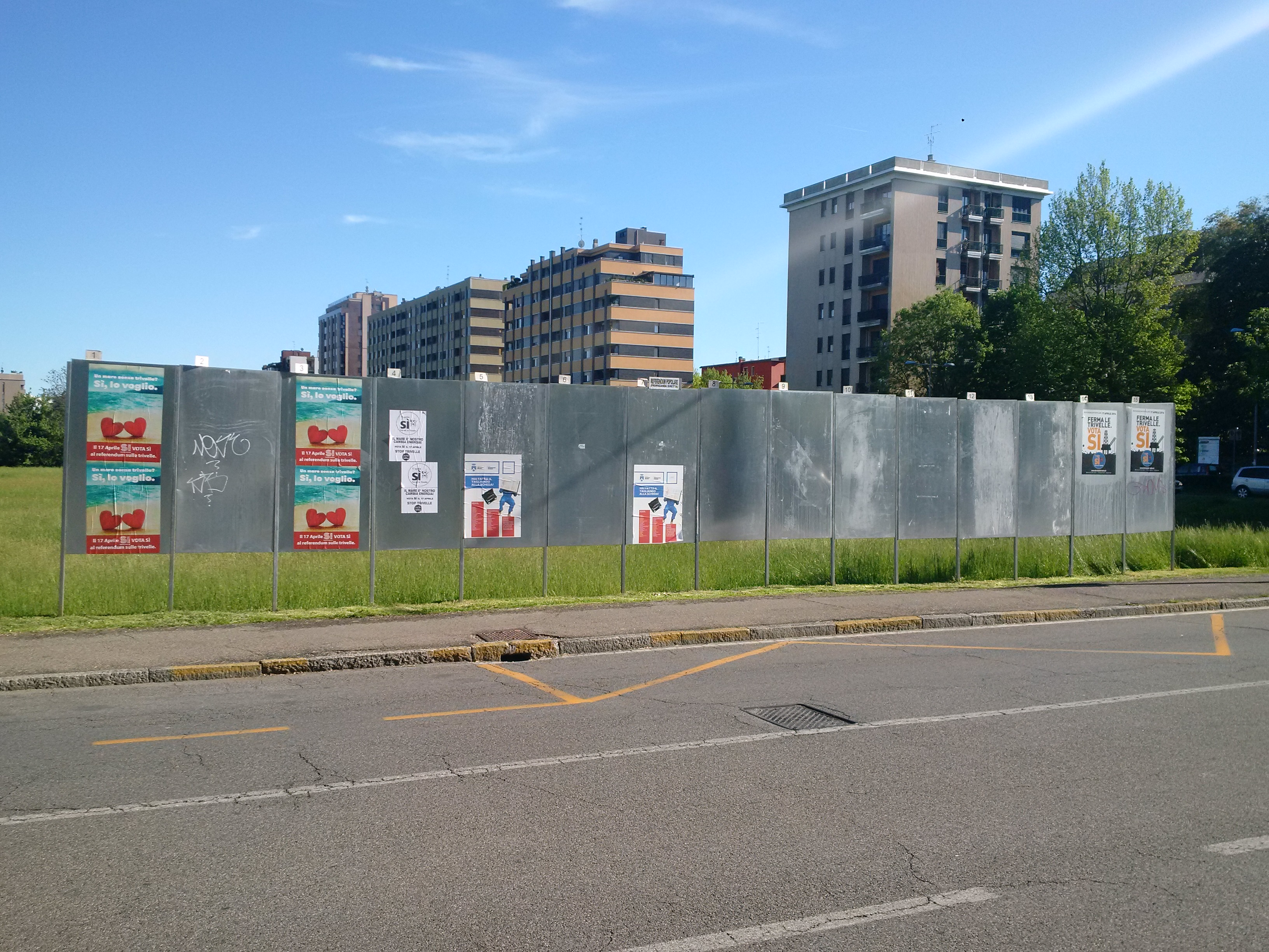 Manifesti accanto al Municipio di San Donato Milanese per il referendum di aprile 2016 (dove erano presenti più manifesti); sono presenti Sinistra Italiana, L'altra Europa con Tsipras e Ferma le Trivelle.